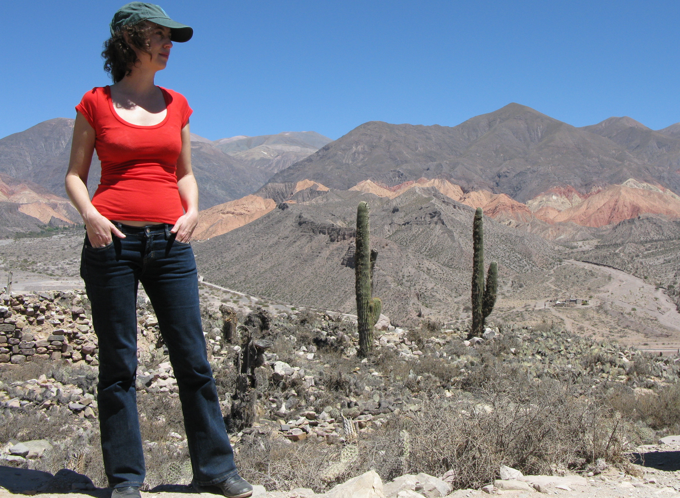 Ina Vandebroek